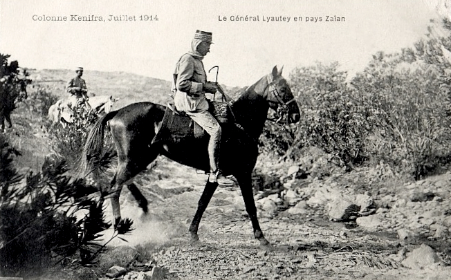 Lyautey en pays Zaïan (Maroc), juillet 1914